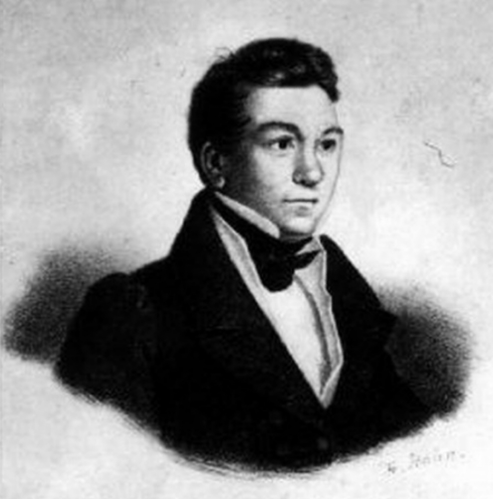 Benoit Tranquille Berbiguier (* 21. Dezember 1782 in Caderousse, Dept. Vaucluse; † 29. Januar 1838 in Pontlevoy), französischer Flötist und Komponist